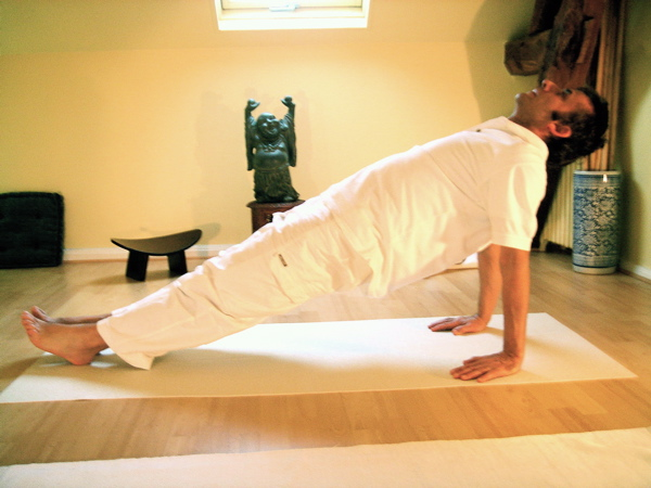 Yoga postures Purvottanasana